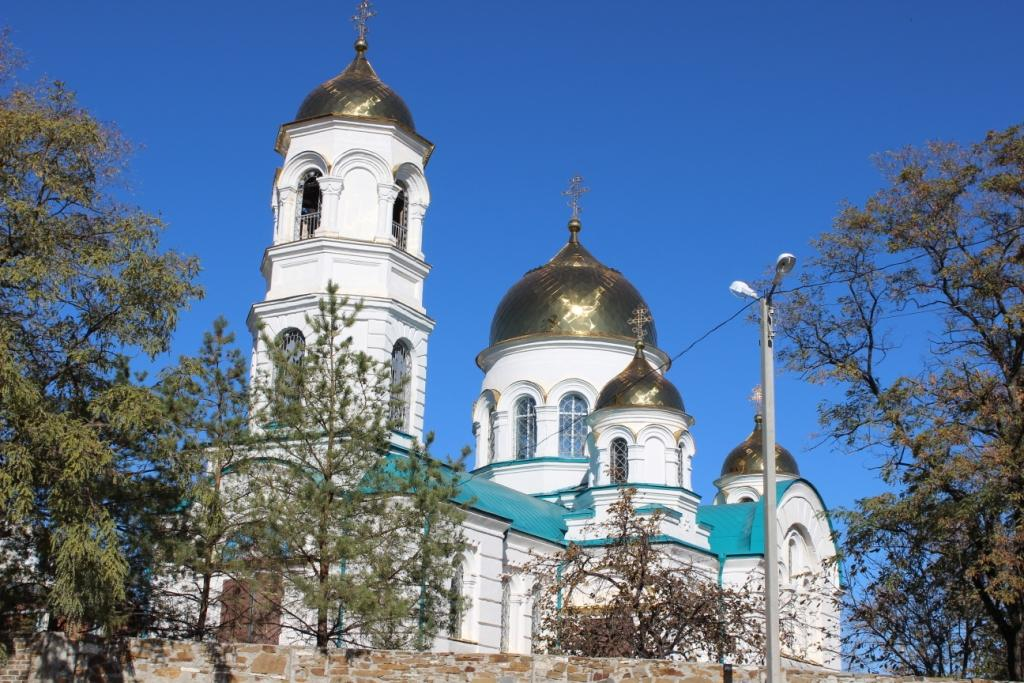 Покровская церковь (Ростовская область, Красный Сулин, Октябрьская улица, 119)